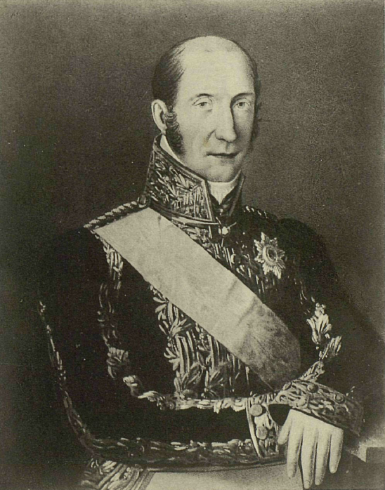 Vasilii Aleksandrovich Pashkov (1764 - 1834)